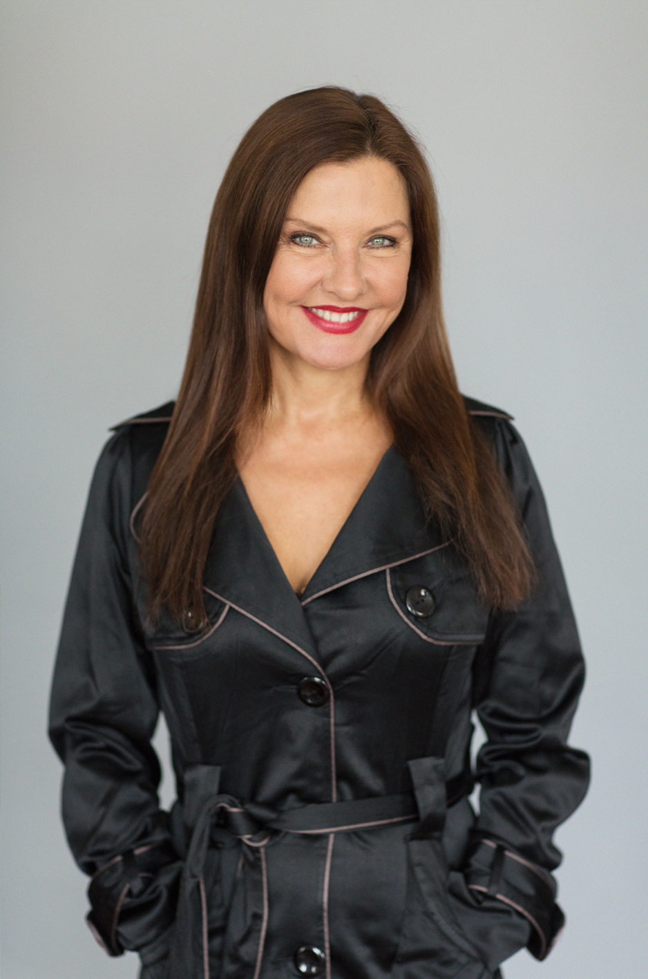 Komikern Anna-Lena Bergelin (f.d. Brundin).